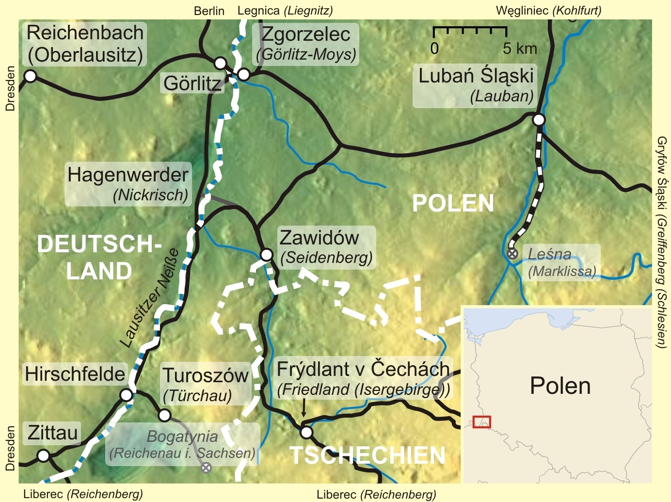 Położenie lini kolejowej Lubań Śląski - Leśna